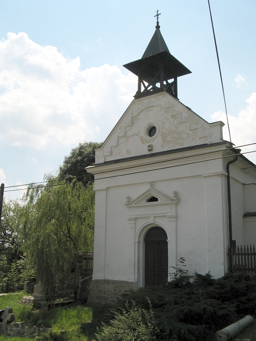 Kaple (Knínice), při silnici Telnice - Petrovice, Knínice, Knínice (Libouchec).